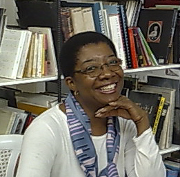 Marilyn Douala Bell, kamerunisch-französische Sozialökonomin und Kulturmanagerin